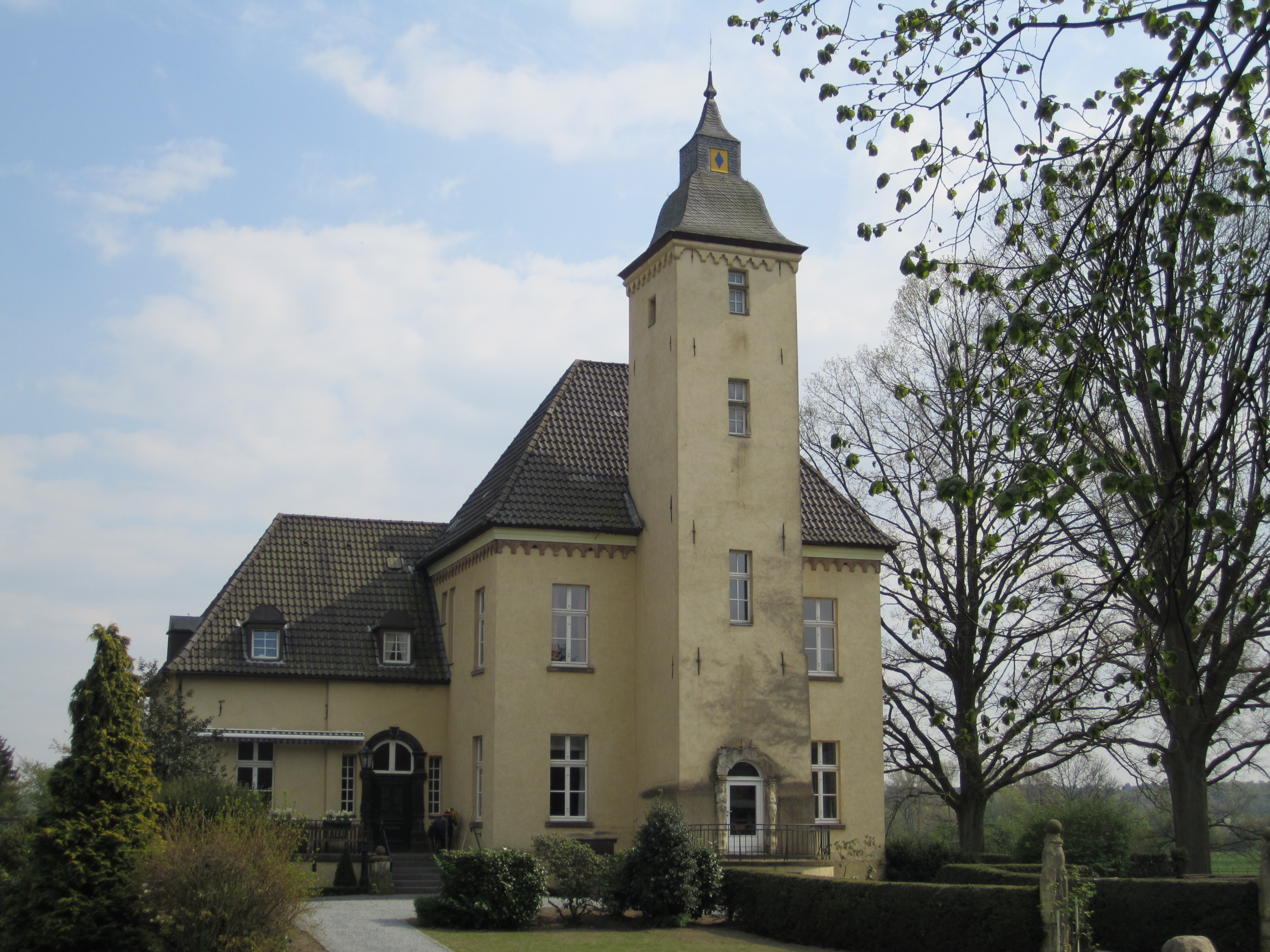 Haus Schwarzenstein, ehemaliger Rittersitz im Ortsteil Drevenack in Hünxe. Aufnahme vom 16. April 2011